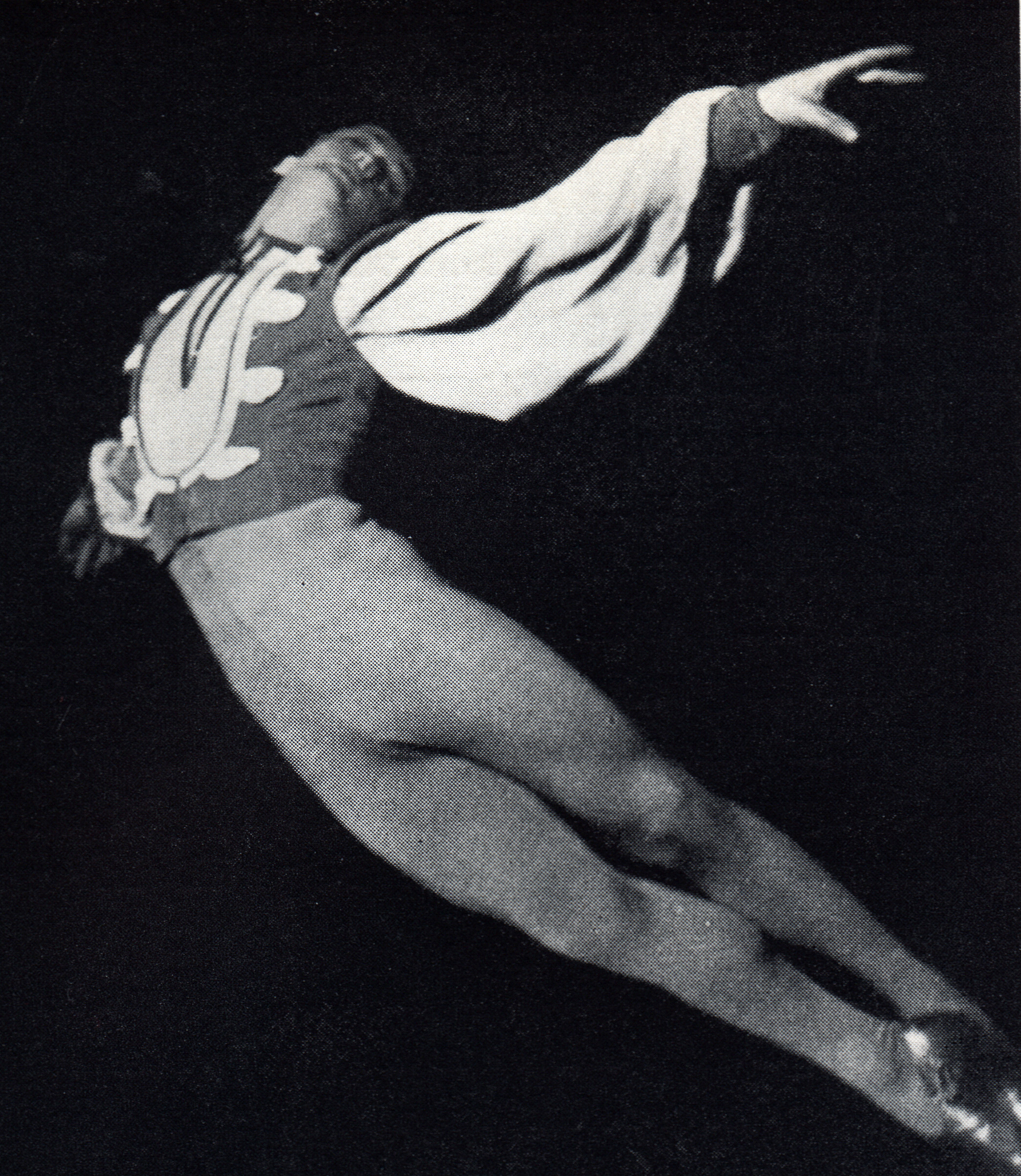 Balettdansören Björn Holmgren i Concerto